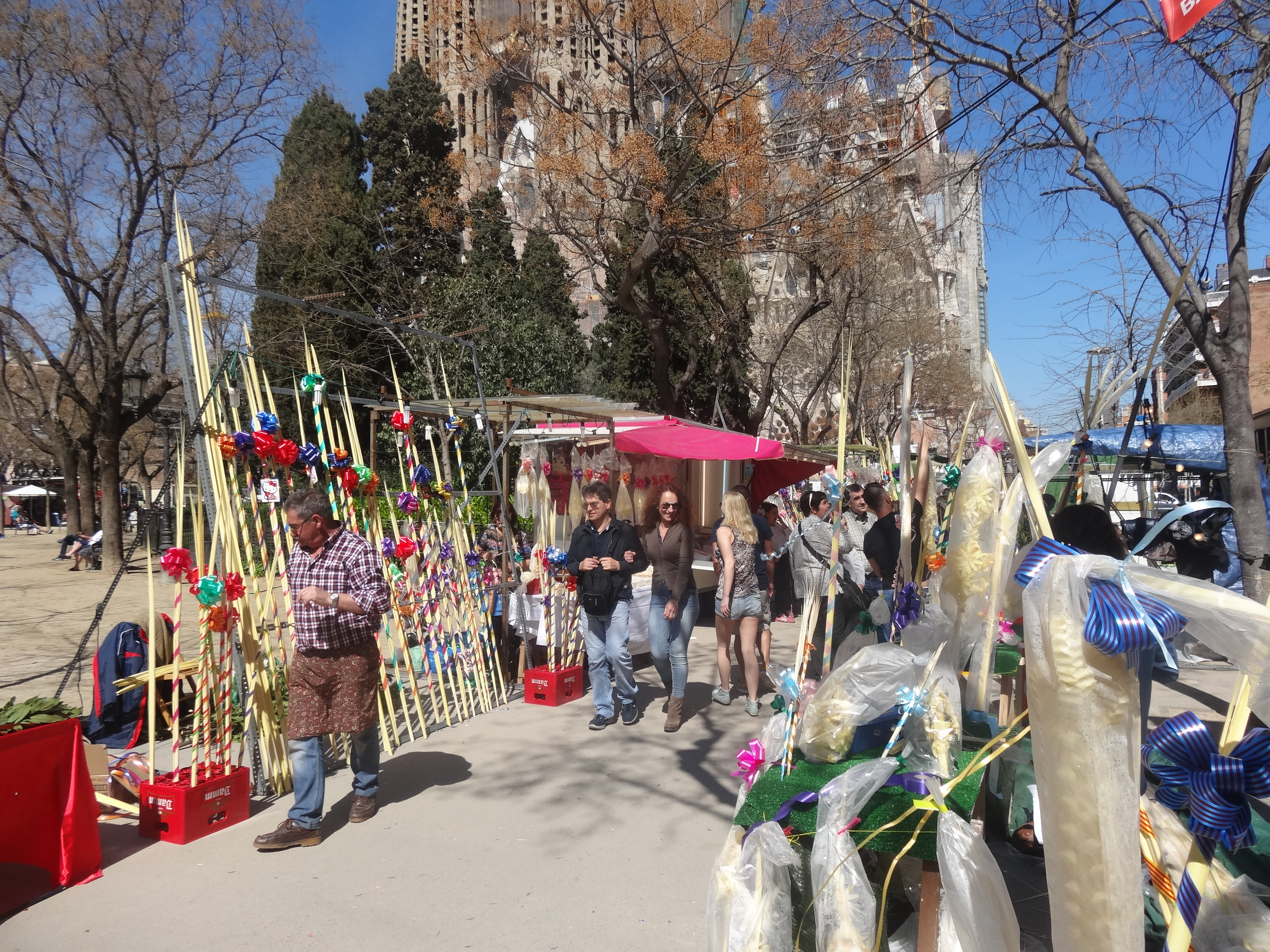 Fira de palmons a la plaça de la Sagrada Família